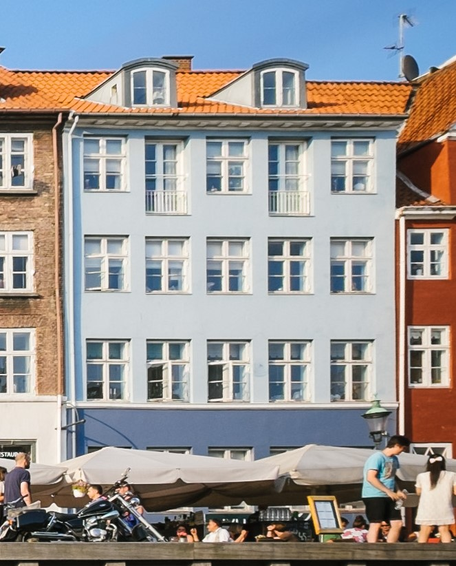 Nyhavn 35 in Copenhagen, Denmark Copenhagen, Denmark